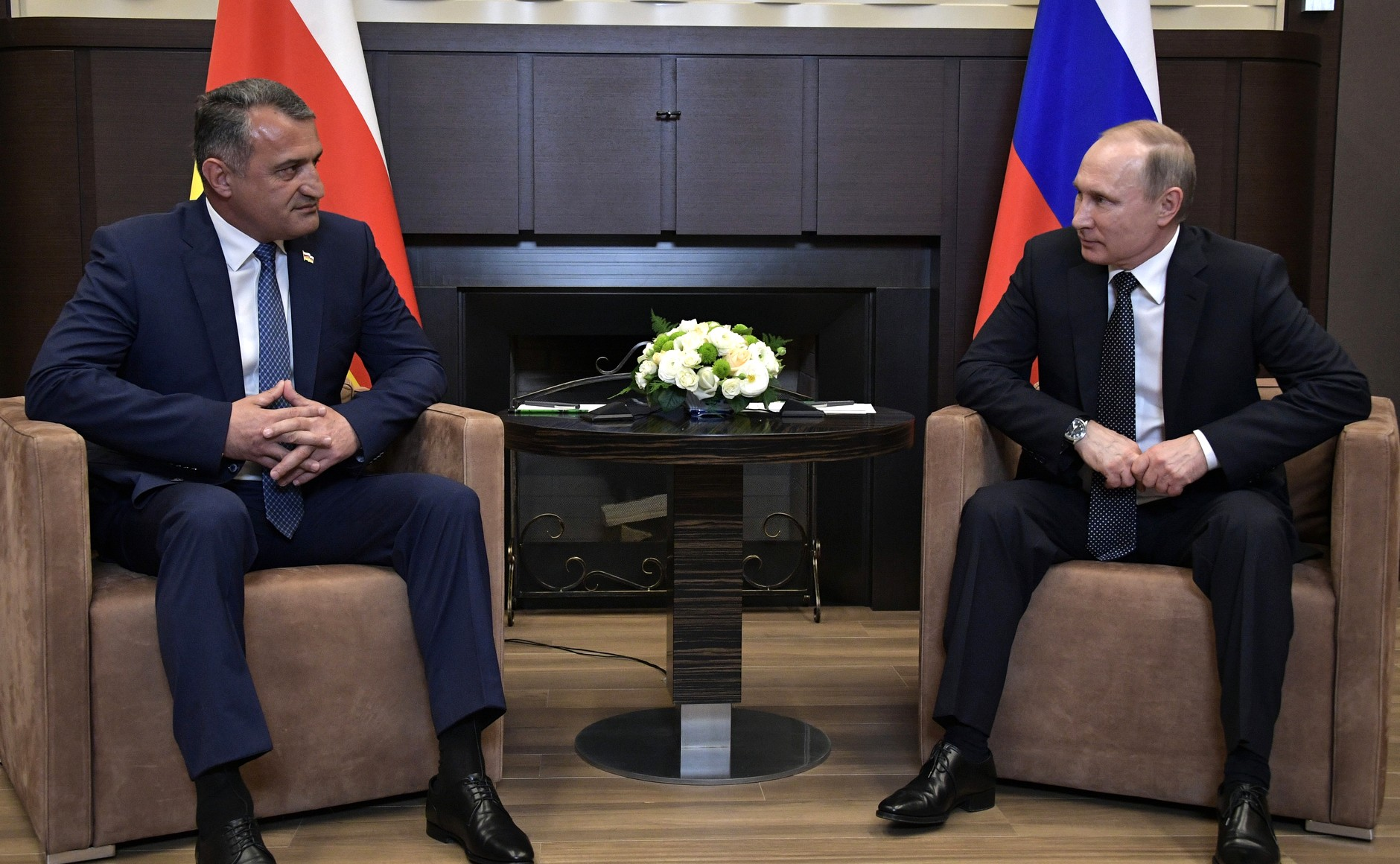 Встреча Президента России Владимира Путина с избранным Президентом Южной Осетии Анатолием Бибиловым